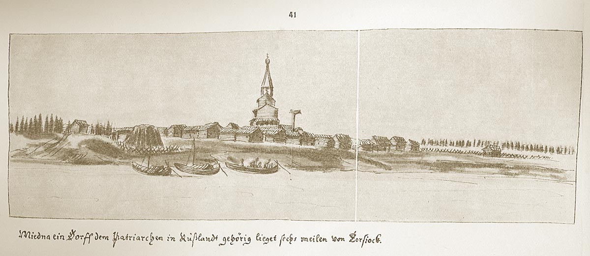 Медная